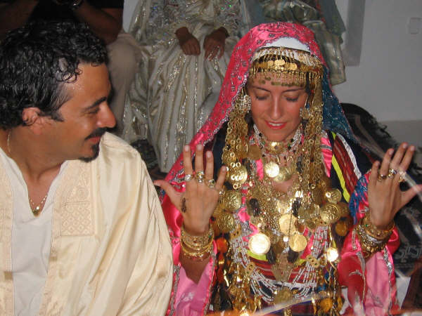 Mariés en tenue traditionnelle de Djerba (cérémonie de la jeloua)